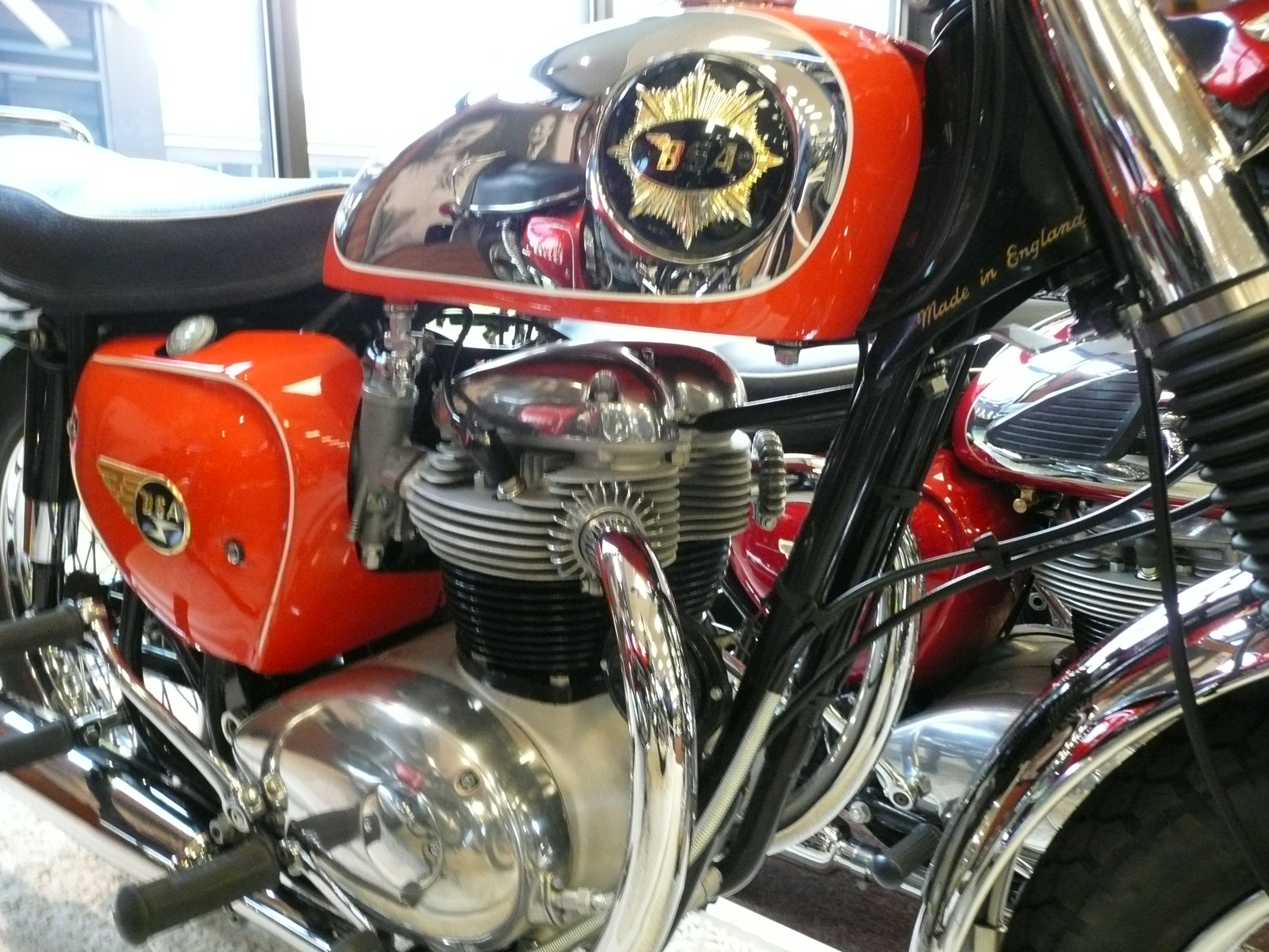 BSA Lightning Rocket 1964 at NMM.JPG